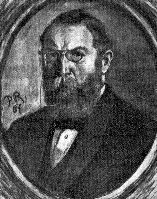 Porträt von Johann Friedrich Schmid (1850–1916) Mediziner. Gemalt von Paul Rüetschi (1878–1947)